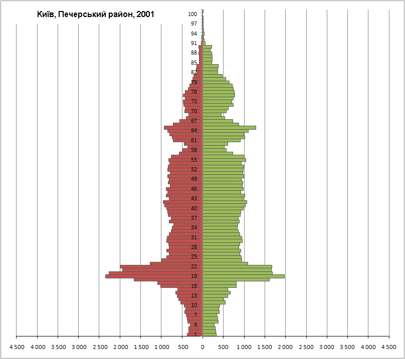 Статево-вікова піраміда населення Печерського району Києва за переписом 2001 р.